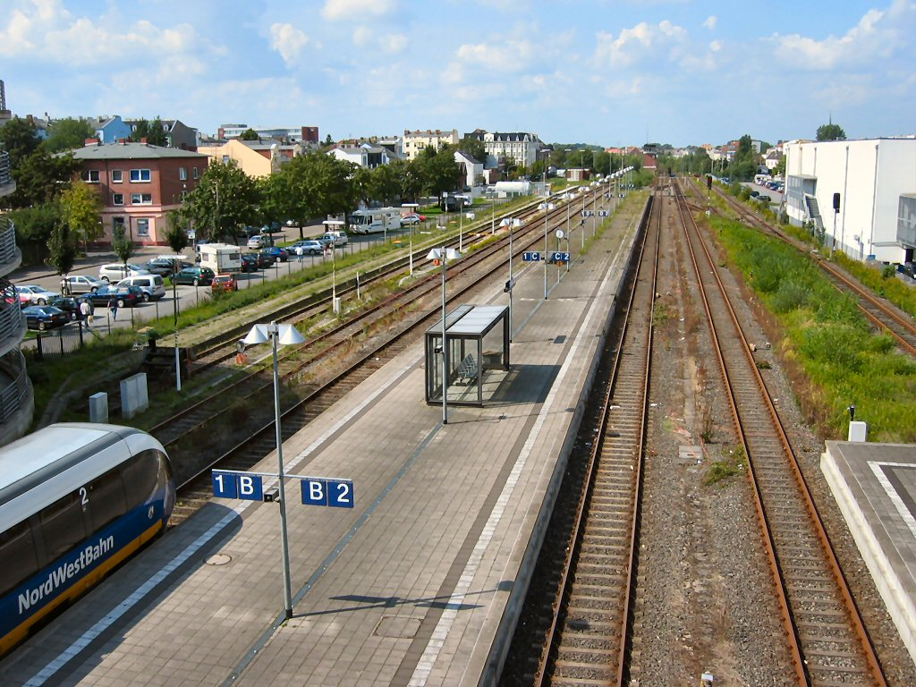 Wilhelmshaven, Blick aus dem Bahnhof